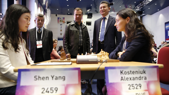 Chess Championship 2015 (Women). Центр Галактика на Горно-туристическом центре Газпром в Красной Поляне.